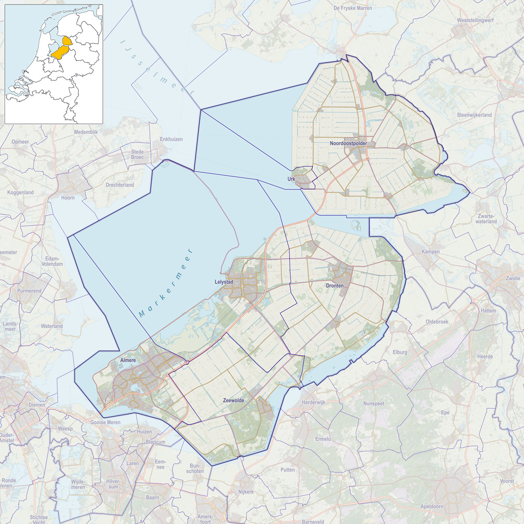 Positiekaartje van de provincie, variant "gemeentelabels"